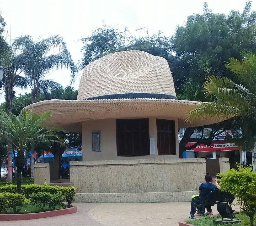 Monumento al Sombreo Pja Toquilla, en Jipijapa, Ecuador.